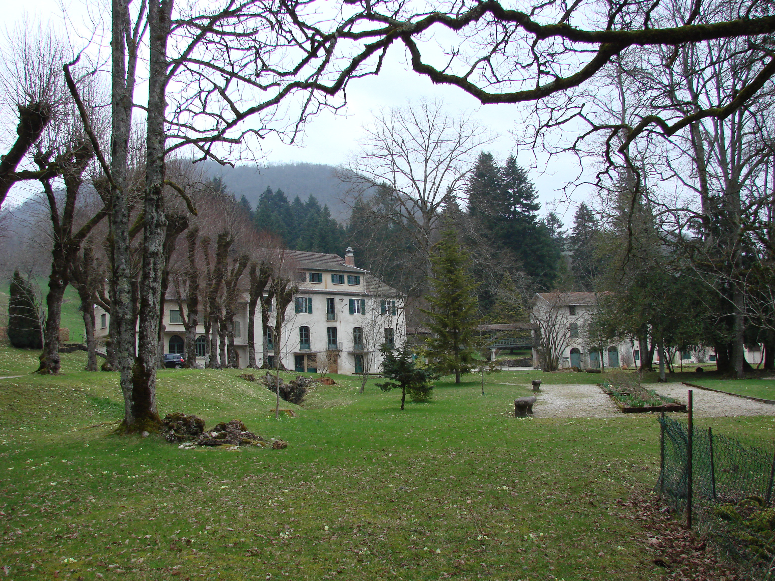 Bâtiments actuels de l'Abbaye de Saint-Rambert-en-Bugey